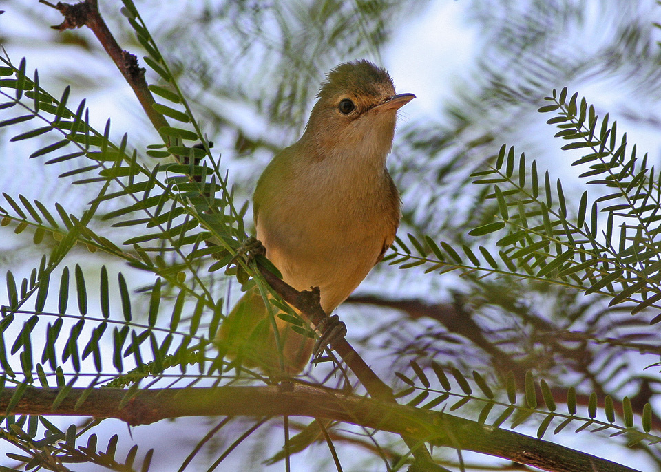 Windhoek to Omarara